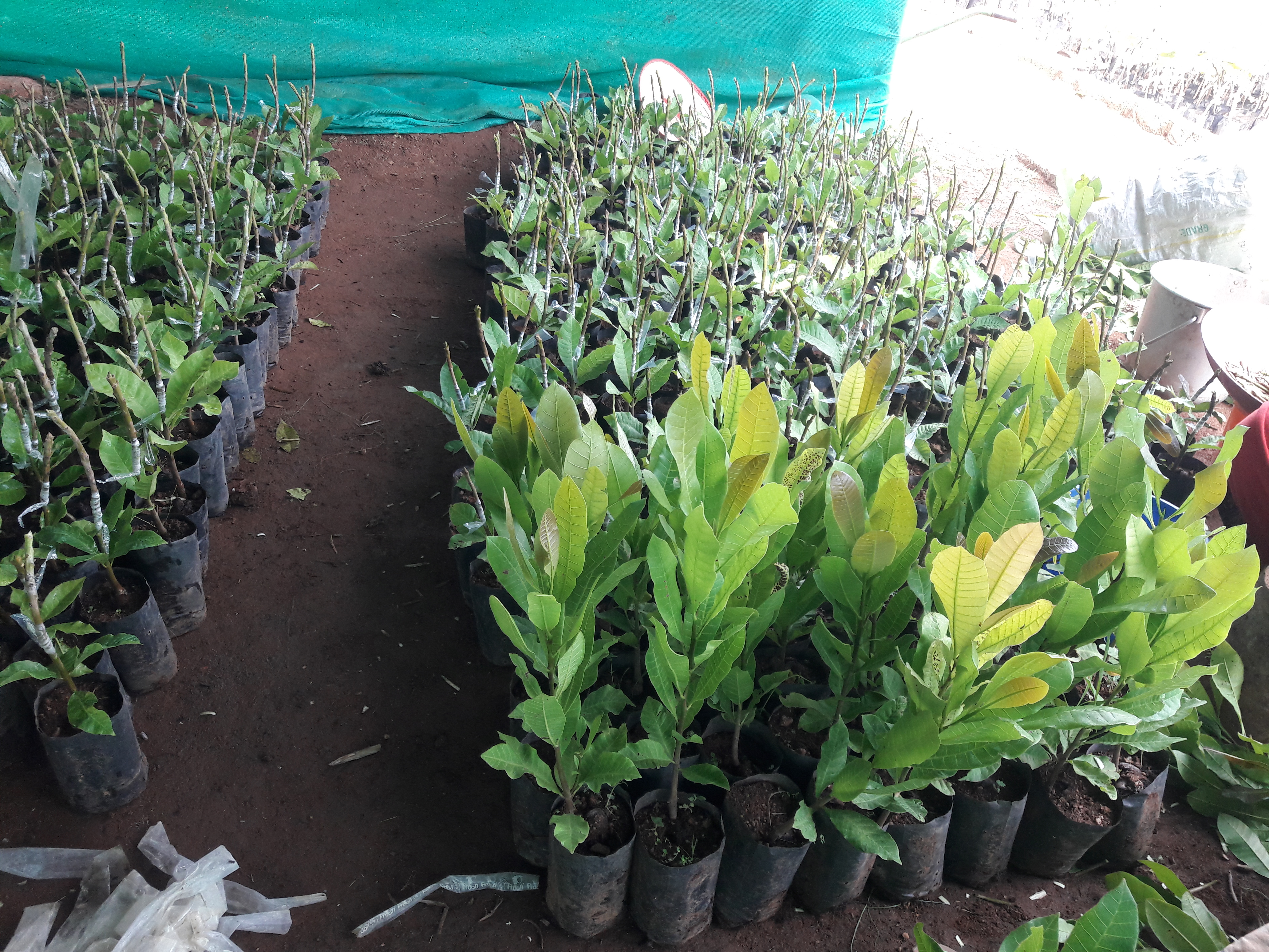 മാടക്കത്തറ കശുമാവ് ഗവേഷണ കേന്ദ്രത്തില്‍ മാവ് സ്റ്റോണ്‍ ഗ്രാഫ്റ്റ് ചെയ്യുന്നു.ശാസ്ത്രീയനാമം: Anacardium occidentale കുടുംബം Anacardiaceae.